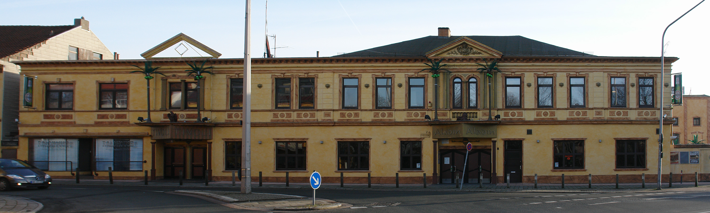 Tivoli und Aladin Music Hall in Bremen-Hemelingen.(Aufnahme perspektivisch entzerrt)